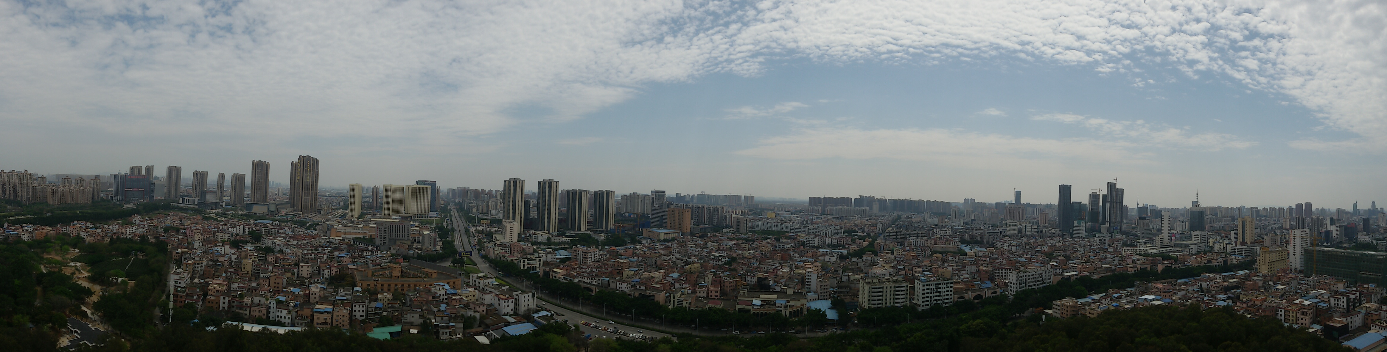 粵語: 佛山北邊嘅全景（喺千燈湖公園嘅魁星樓頂影）